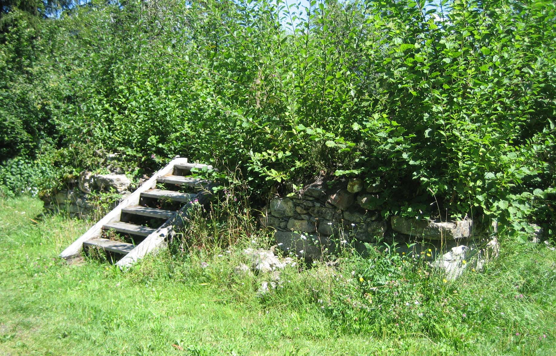 Reste der Kirche